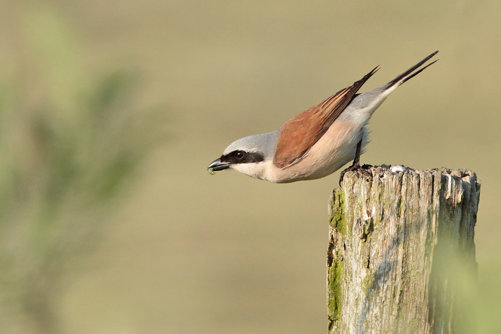 Neuntöter in der Nähe des Ilkerbruchs